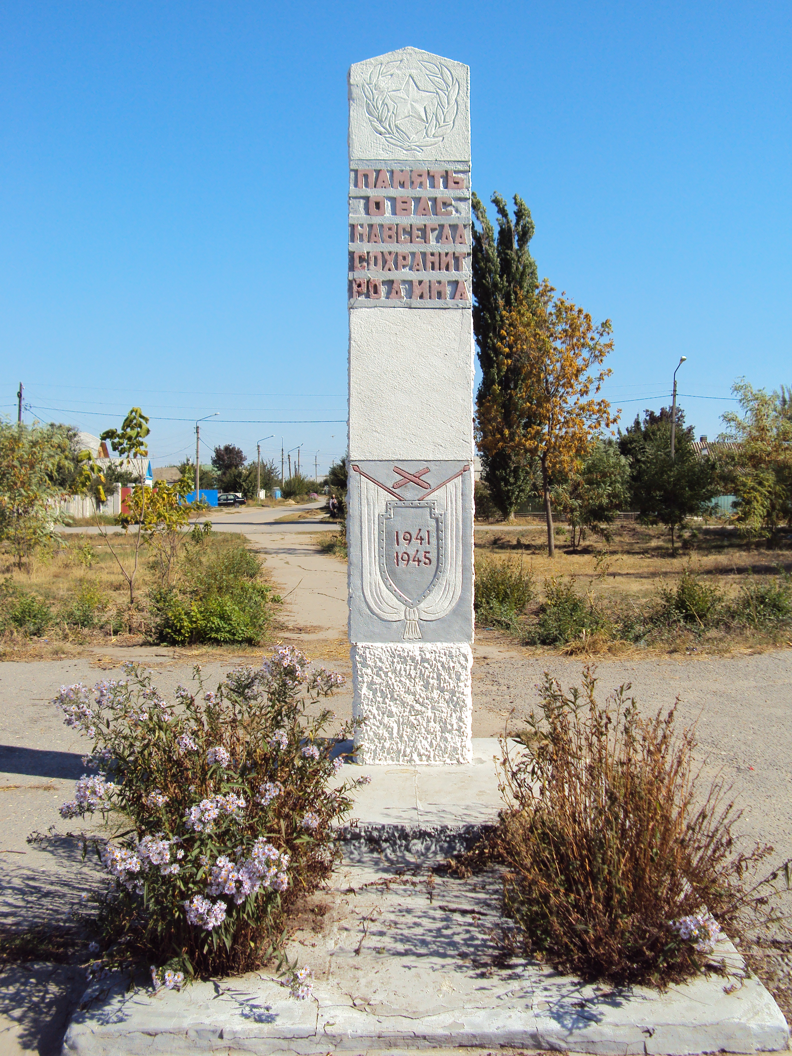 Мемориал в память о погибших бойцах, располагается позади железнодорожной станции.